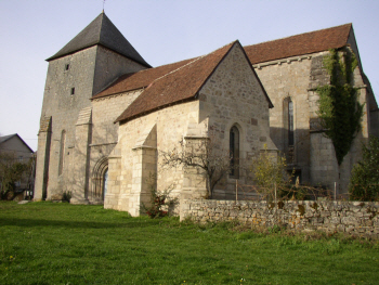 Chapelles saint Jean et saint Fiacre de Paulhac (Creuse)